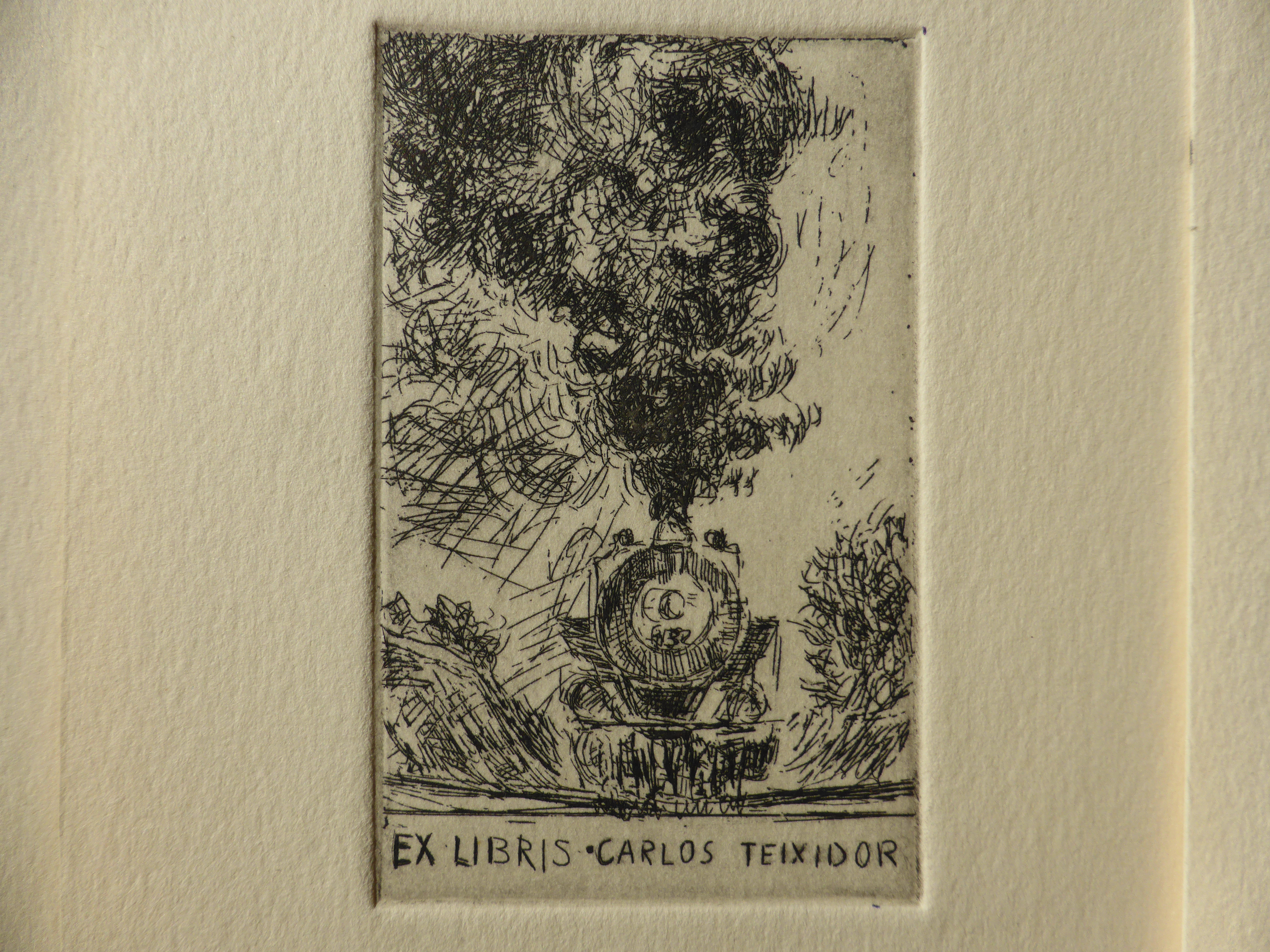 Ex libris realizado por la artista chilena Ximena Medina Sancho. Grabado al aguafuerte.